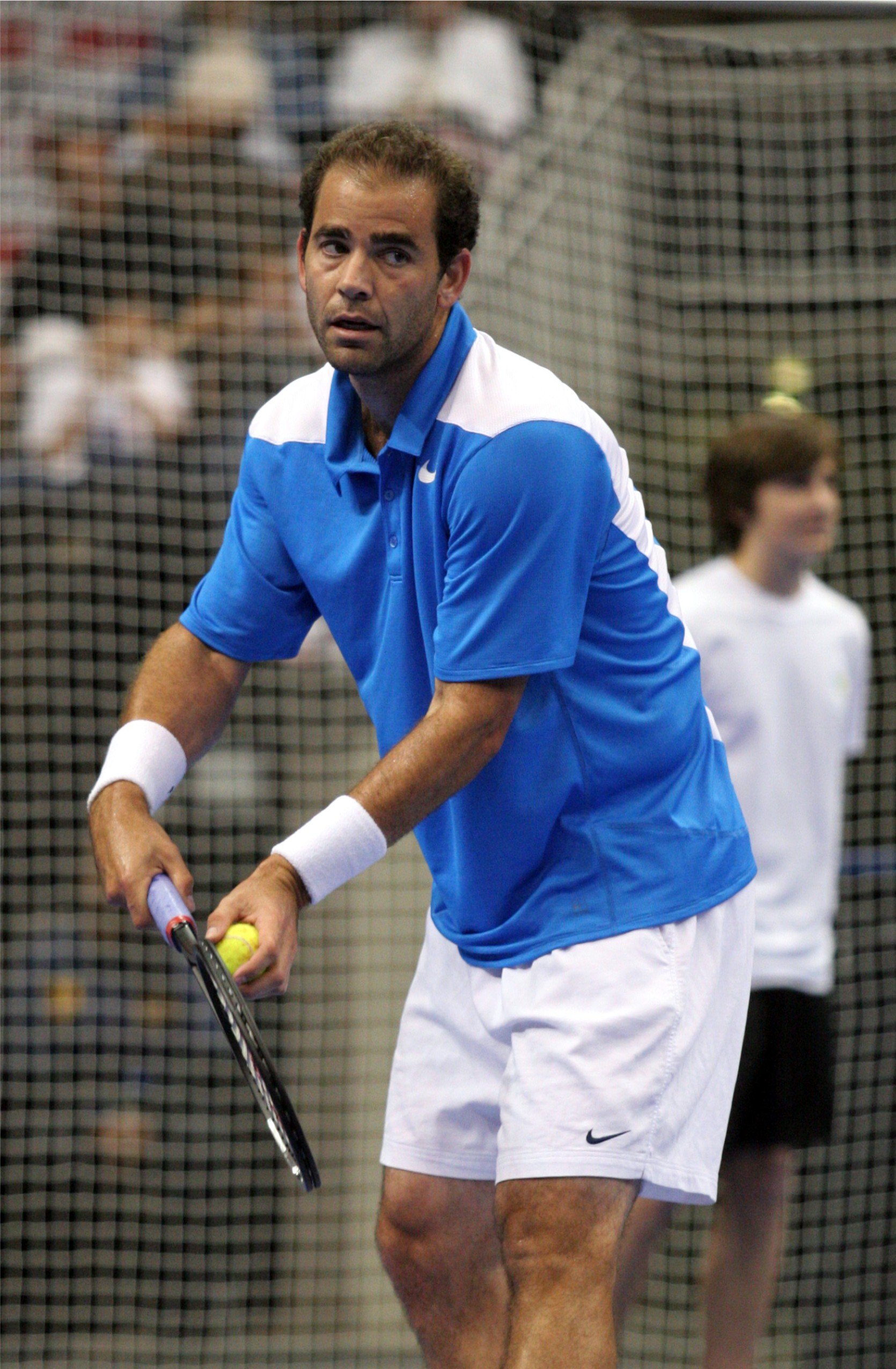 Pete Sampras serving, 2008